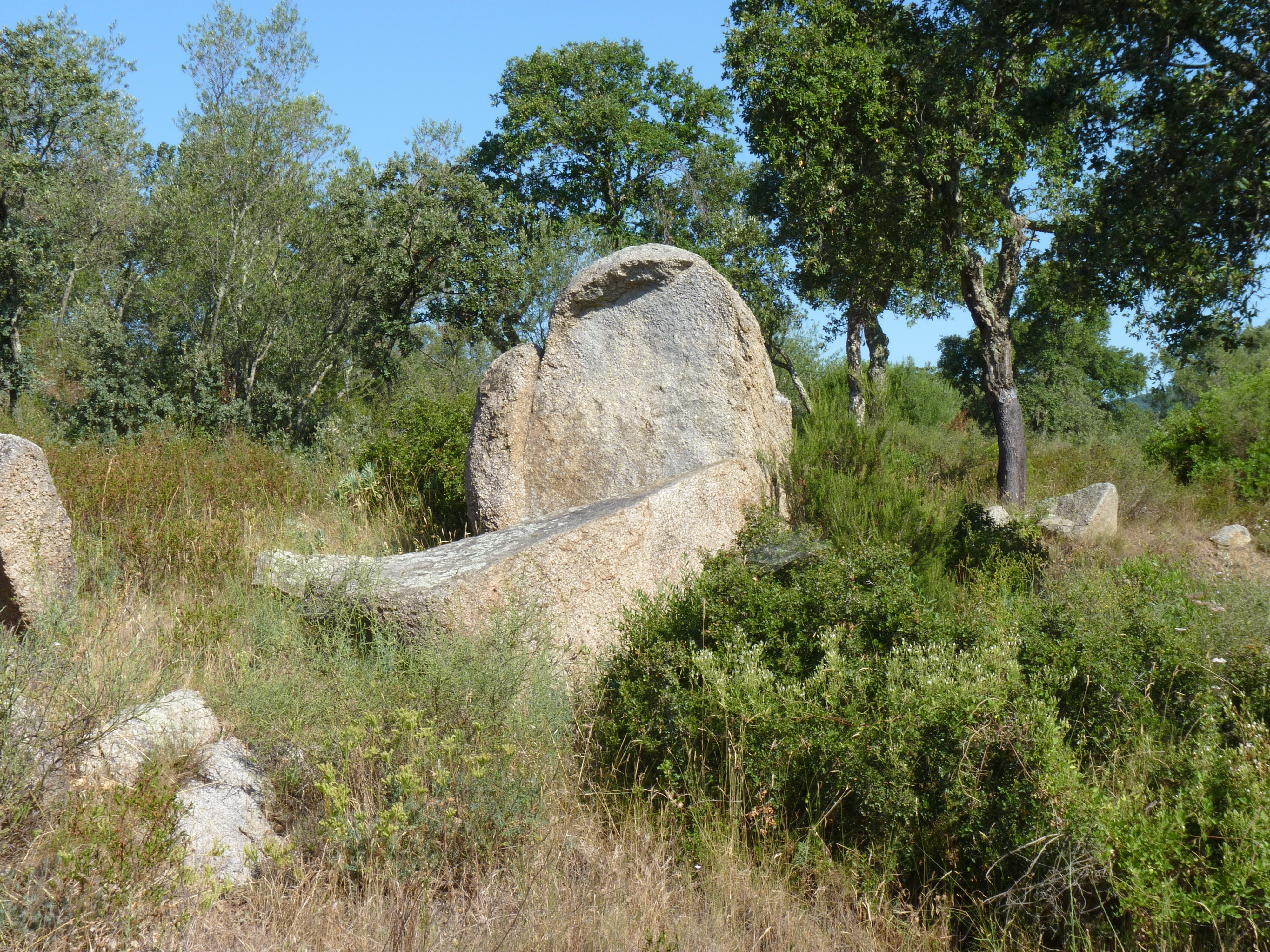 Les mégalithes au nord de Capmany, près de l'étang de Palau de Baix, La Jonquères (Haut-Ampurdan, Gérone, Catalogne, Espagne)